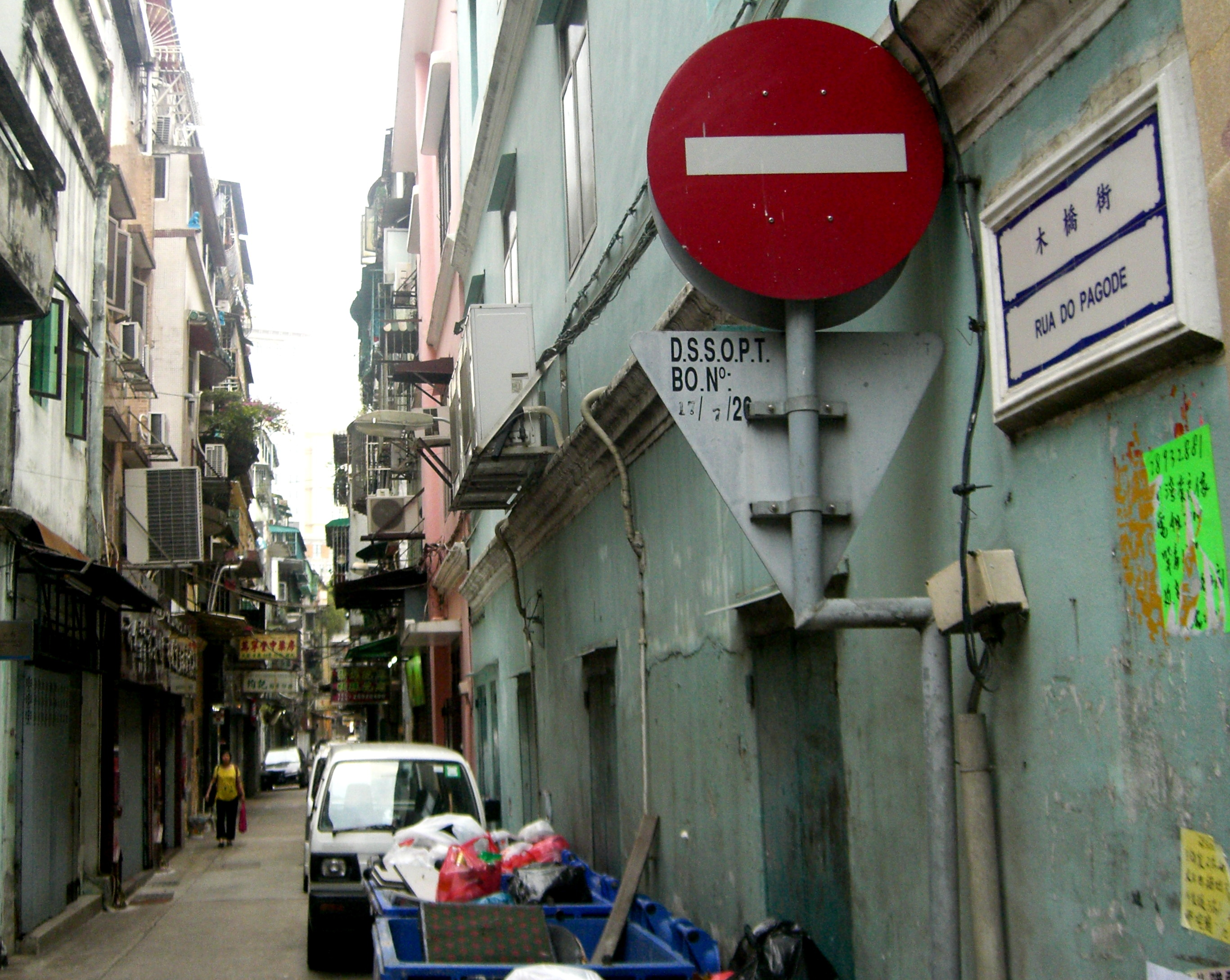 Rua do Pagode